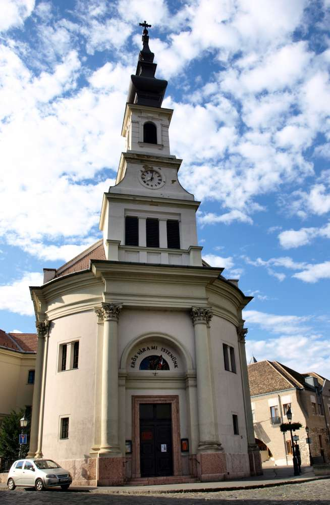 Budavári evangélikus templom. Épült Kallina Mór tervei szerint 1895-ben